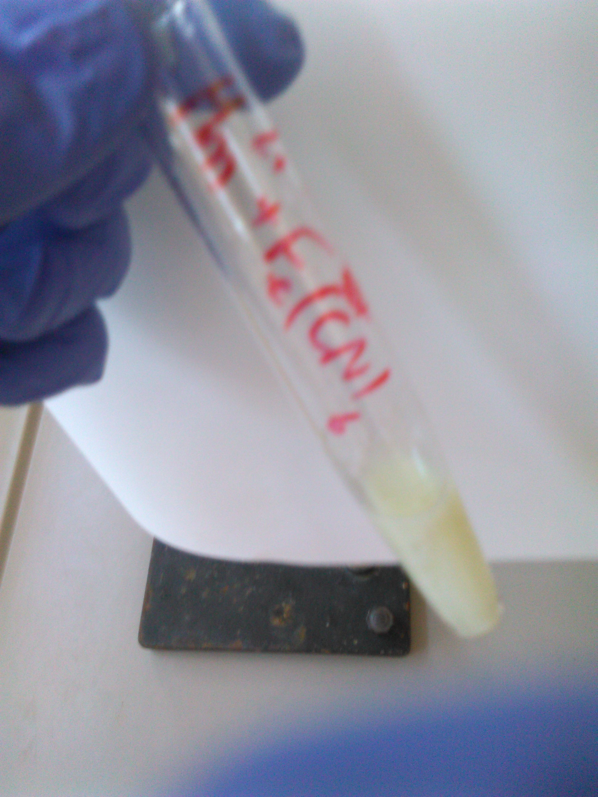 Ferrocianuro di manganese.